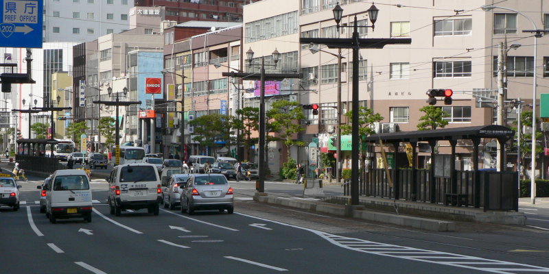 長崎電気軌道、大波止電停